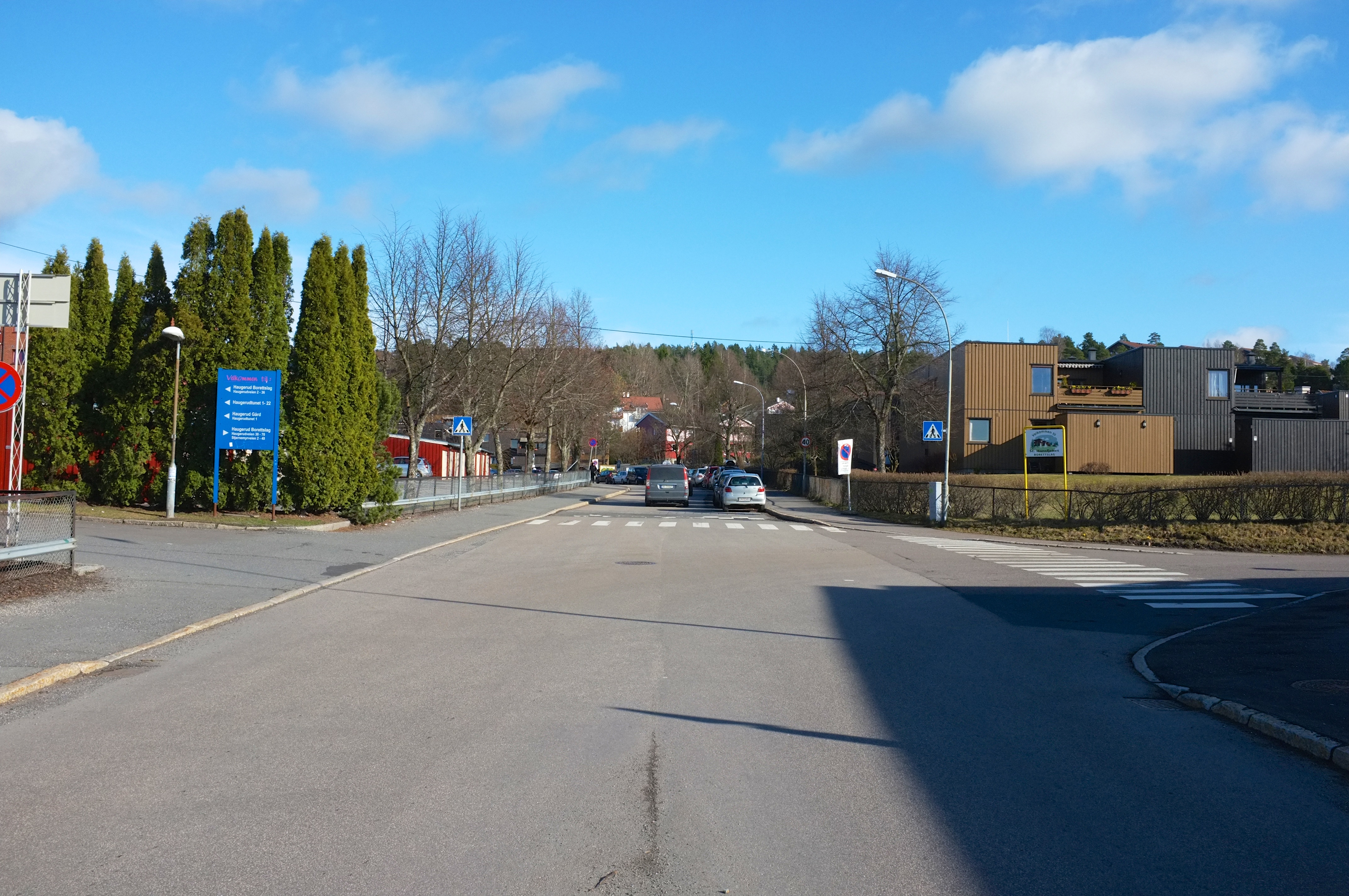 Haugerudveien i Oslo.